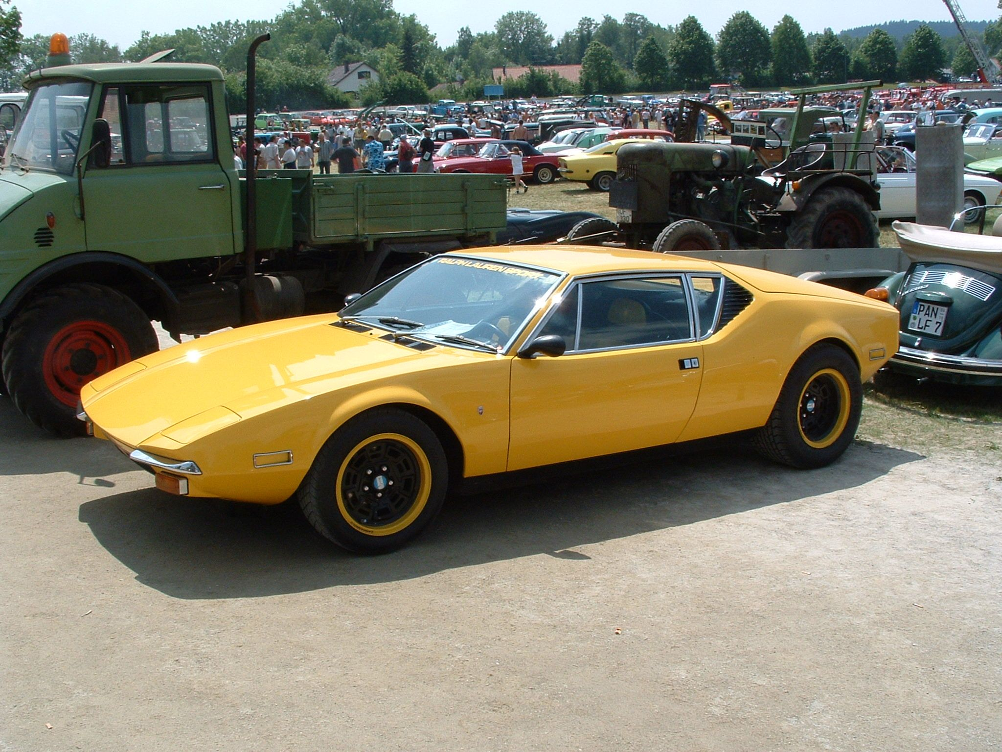 De Tomaso Pantera Seitenansicht